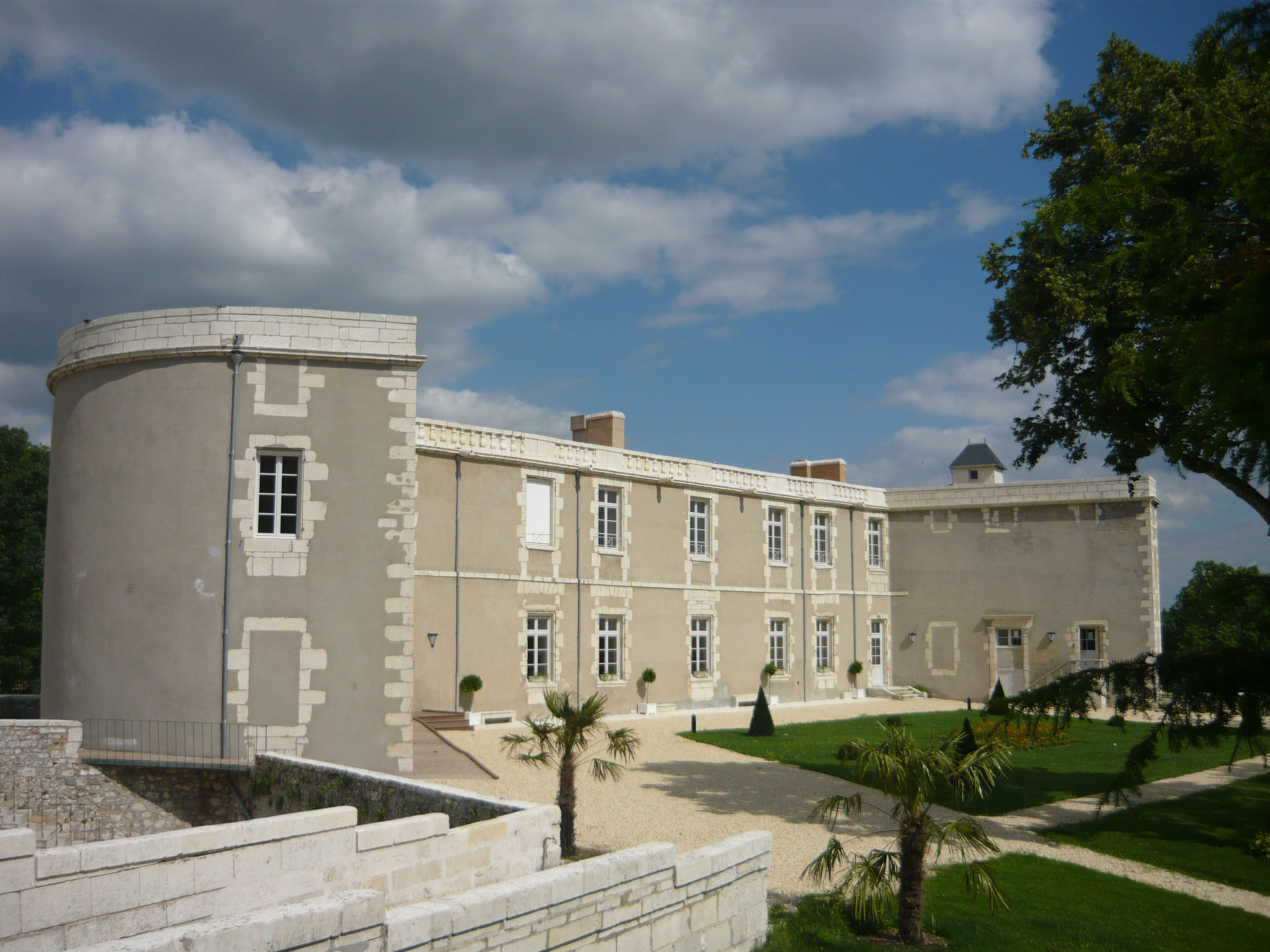 Vue d'ensemble du Château de Rochechouart de Tonnay-Charente. Charente-Maritime, France.